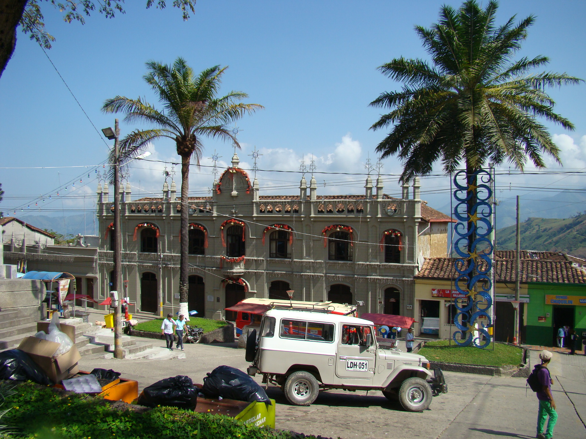 Aspecto exterior de la alcaldía de Titiribí, Antioquia.